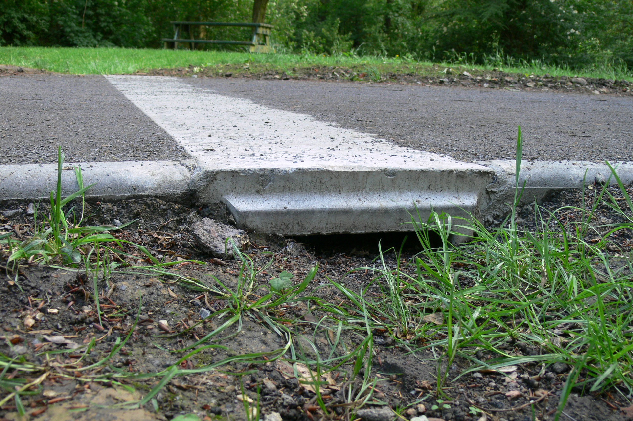 Écoduc dit « lombriduc », destiné à permettre aux vers de terre et à d'autres invertébrés ou micromammifères de traverser ce chemin de promenade (Lille, Nord de la France). La terre qui est dans ce passage en forme de U renversé est la terre d'origine qui n'a pas été déplacée ni damée durant le chantier. Ce passage est destinée à diminuer la contribution du chemin à la fragmentation écologique du milieu.